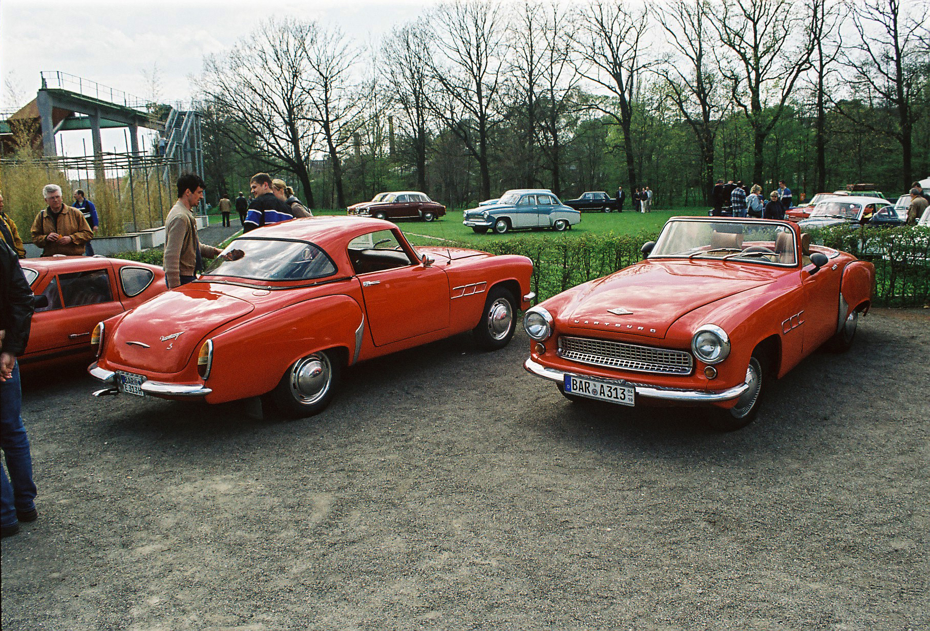 historischer Wartburg beim Oldtimertreffen im Familiengarten Eberswalde